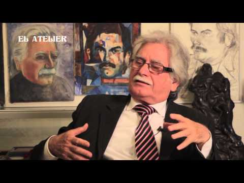 Escritor Novelista: Juan Felix Cortes Espinosa